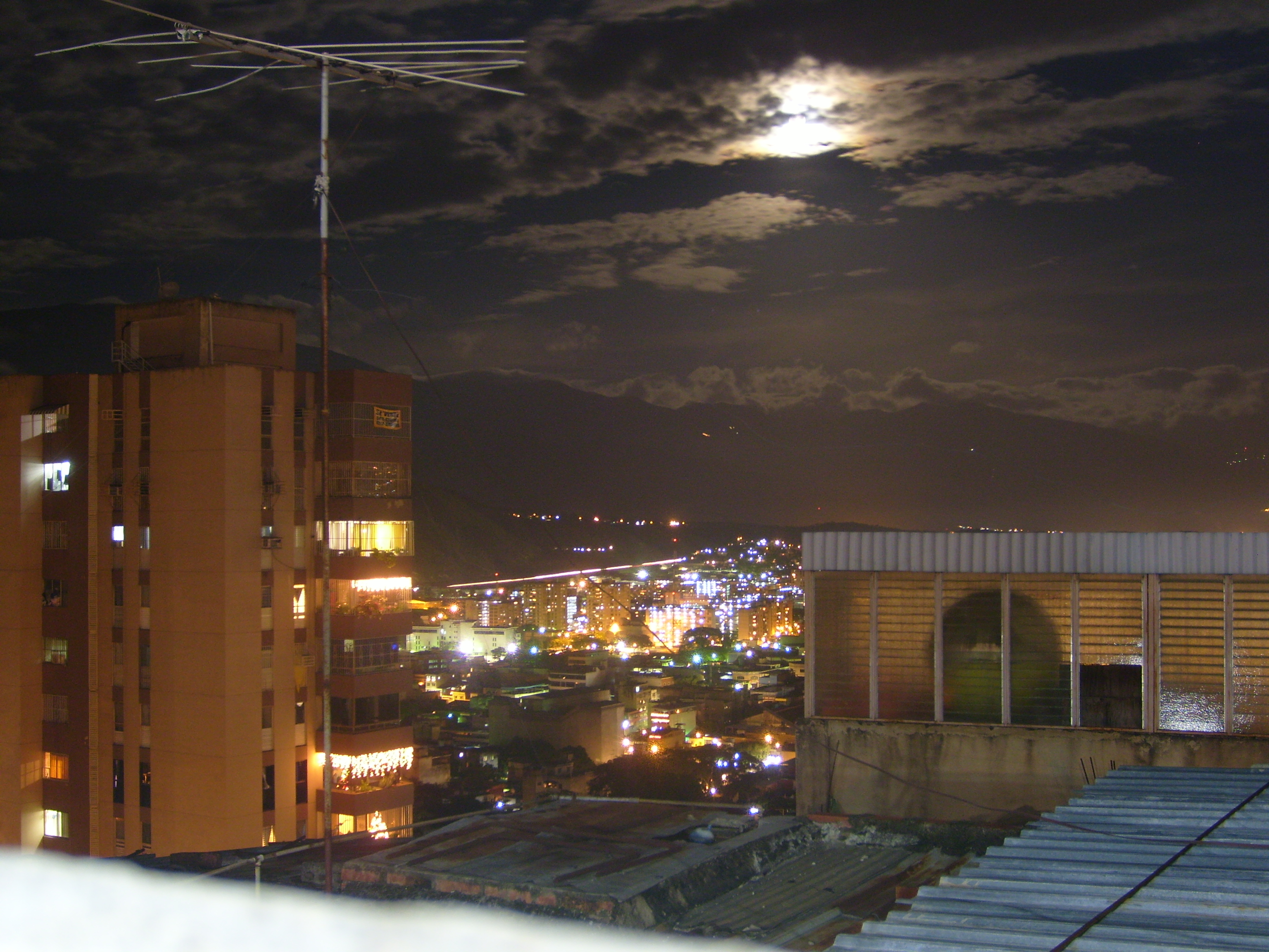 Guarenas Nocturna